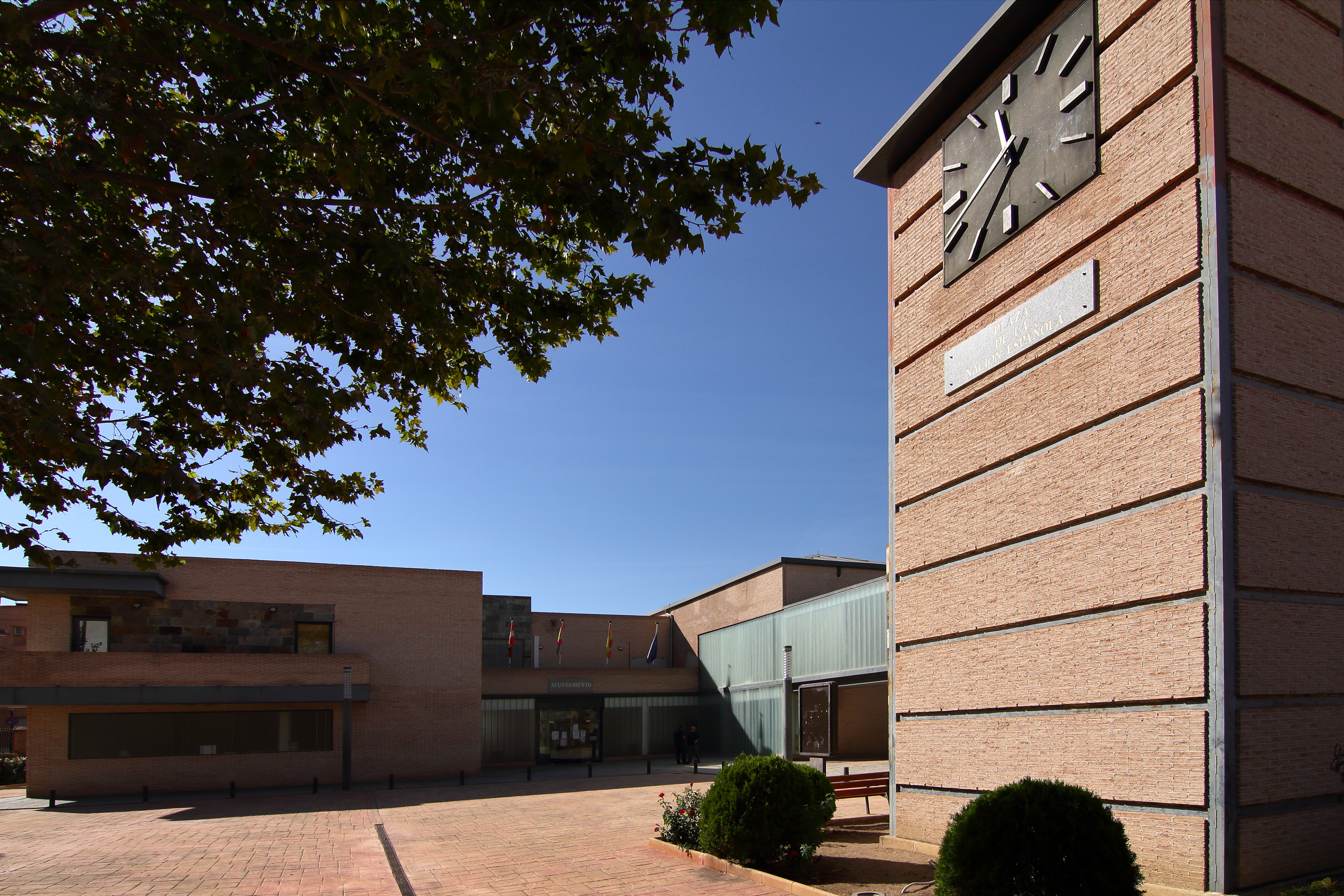 Ayuntamiento de El Viso de San Juan